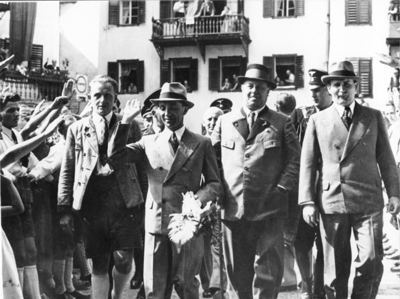 St. Wolfgang, Joseph Goebbels und Emil Jannings ADN-ZB/Archiv Faschistisches Deutschland 1933-1945 Der faschistische Propagandaminister Goebbels (3.v.r.) und der Schauspieler Emil Jannings (2.v.r.) 1938 in St. Wolfgang [Oberösterreich]. 9682-38 Abgebildete Personen: Jannings, Emil: Schauspieler, Deutschland Goebbels, Joseph: Reichsminister für Volksaufklärung und Propaganda, Gauleiter Berlin, Deutschland